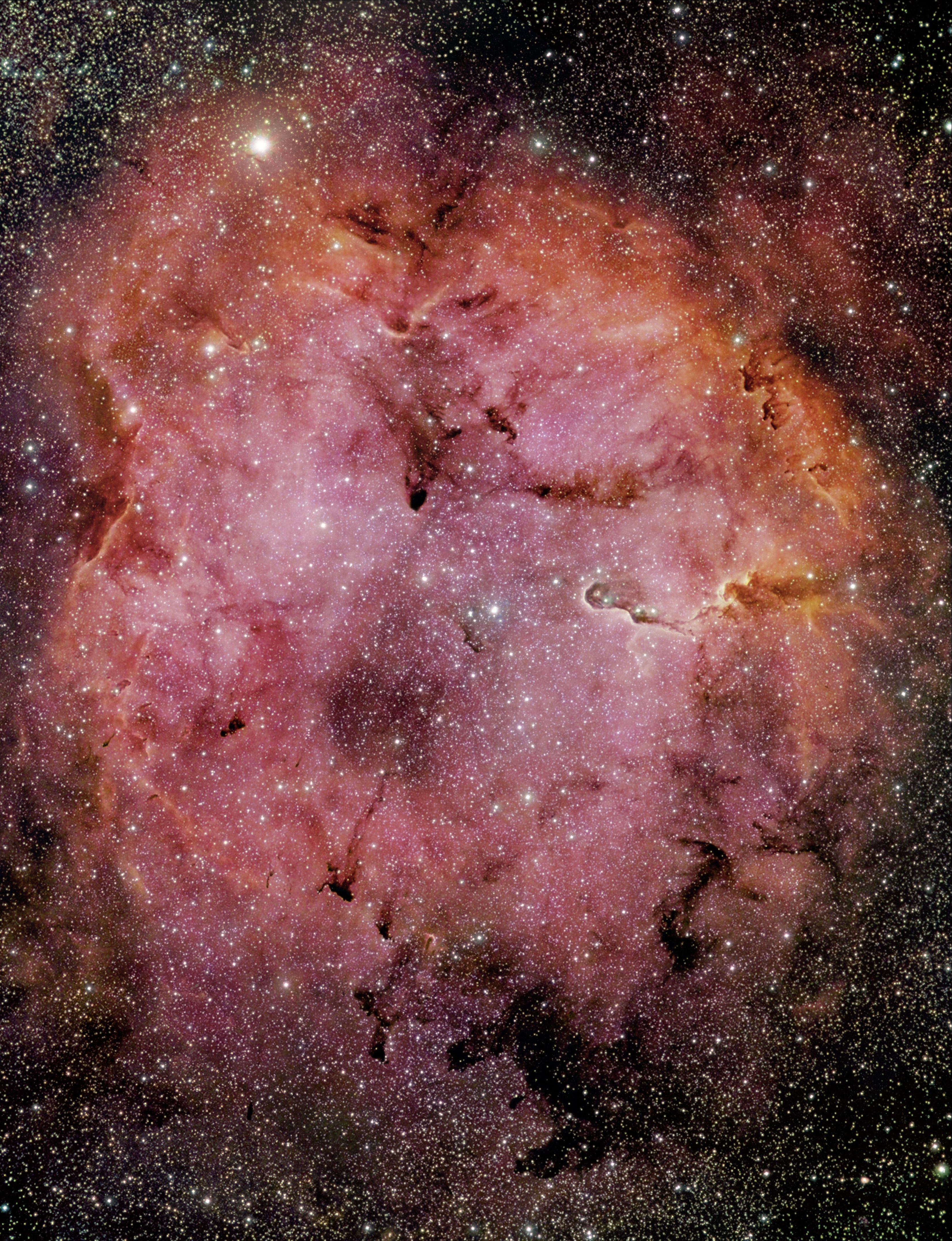 IC 1396 rev 20140921 s